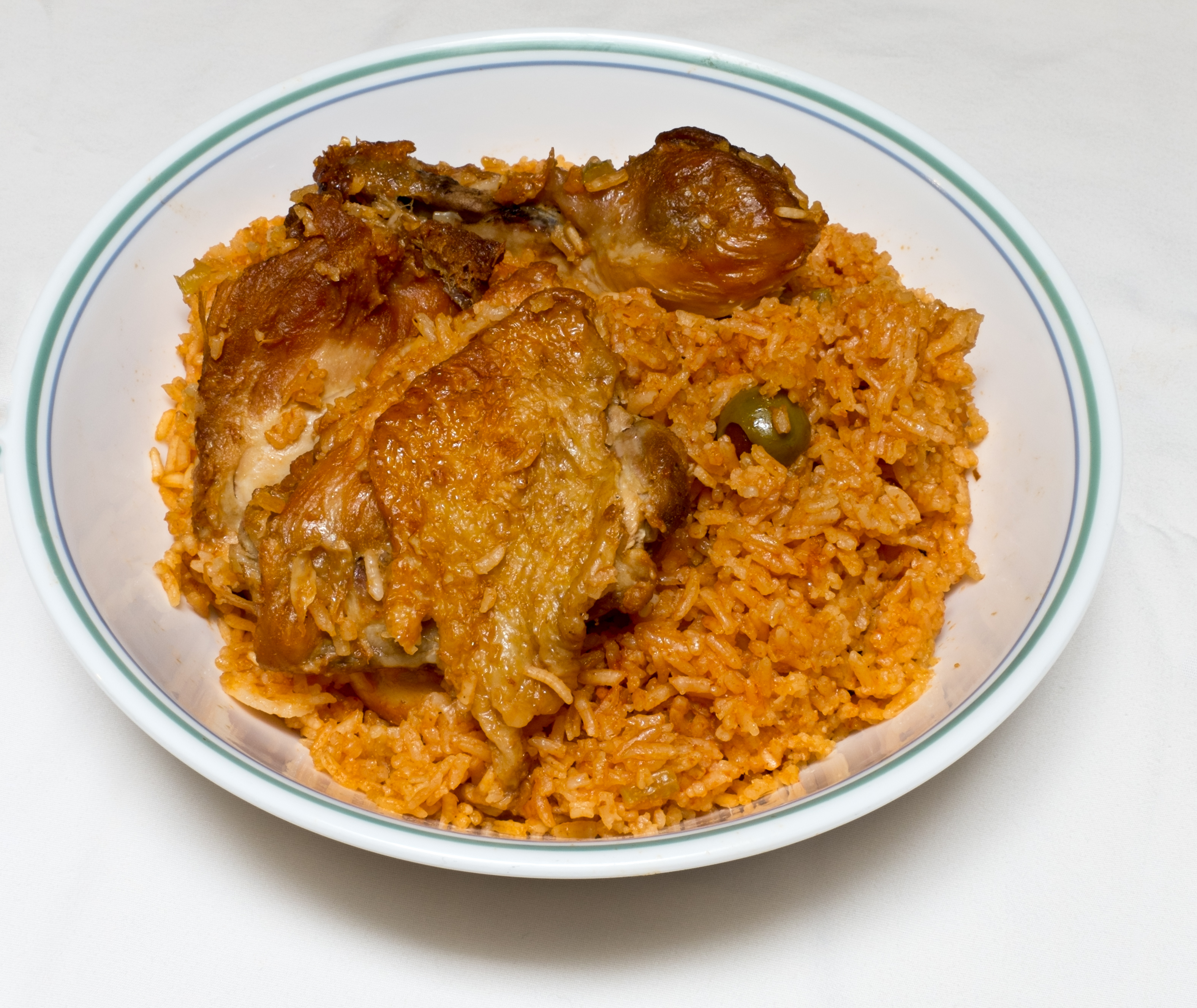 Un Locrio de Pollo, un típico de la Republica Dominicana